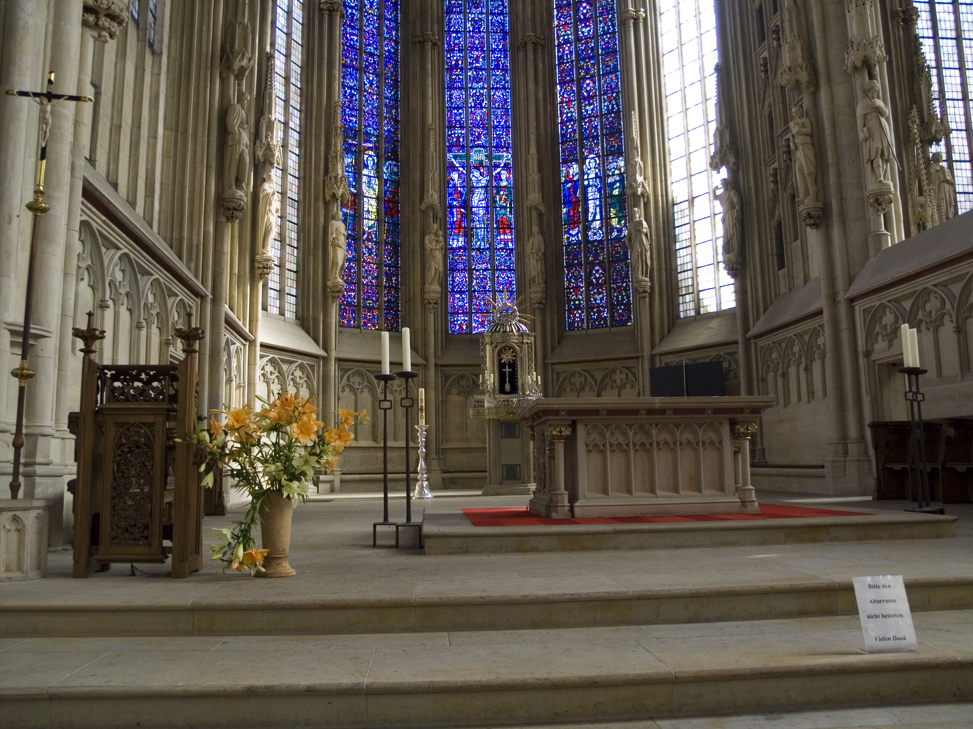 Северный Рейн - Вестфалия, Мюнстер - церковь Святого Ламберта